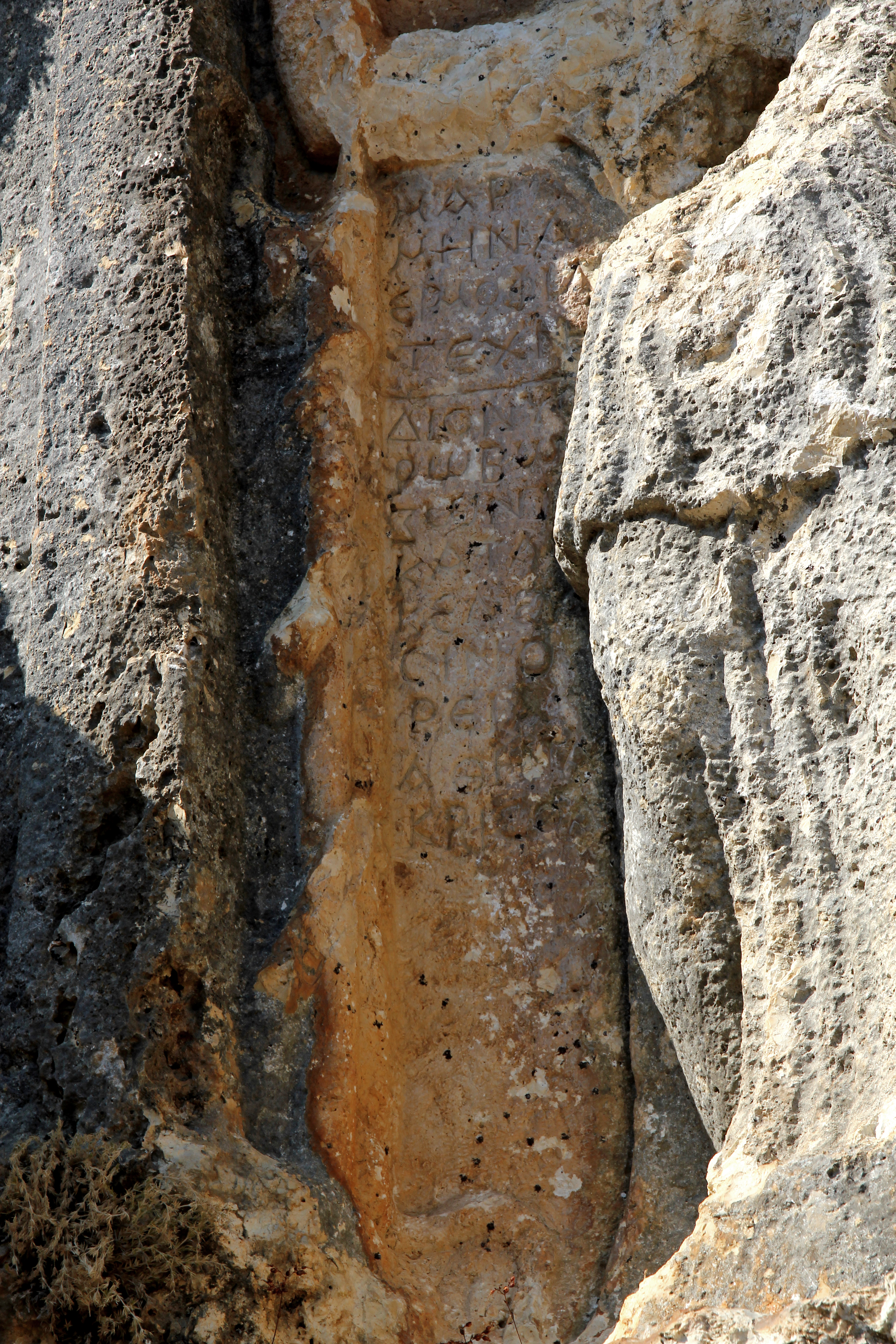 Athena-Relief bei Sömek, Südtürkei, Inschrift